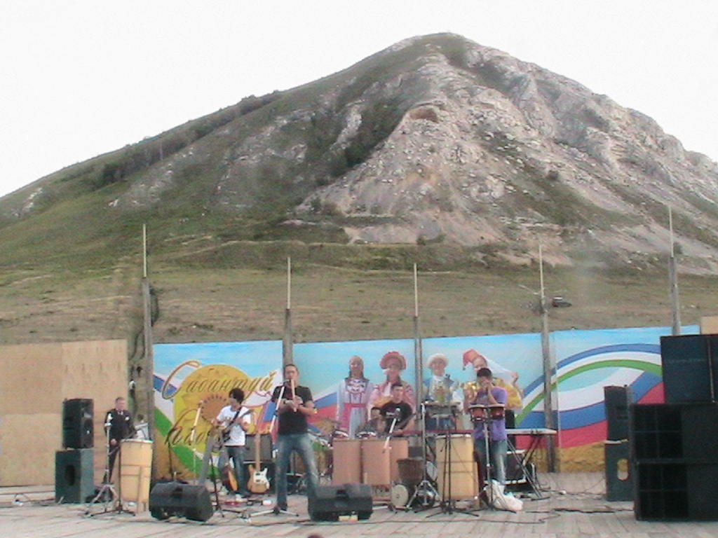 Выступление этно-фольк-группы "Аргамак" (Уфа)